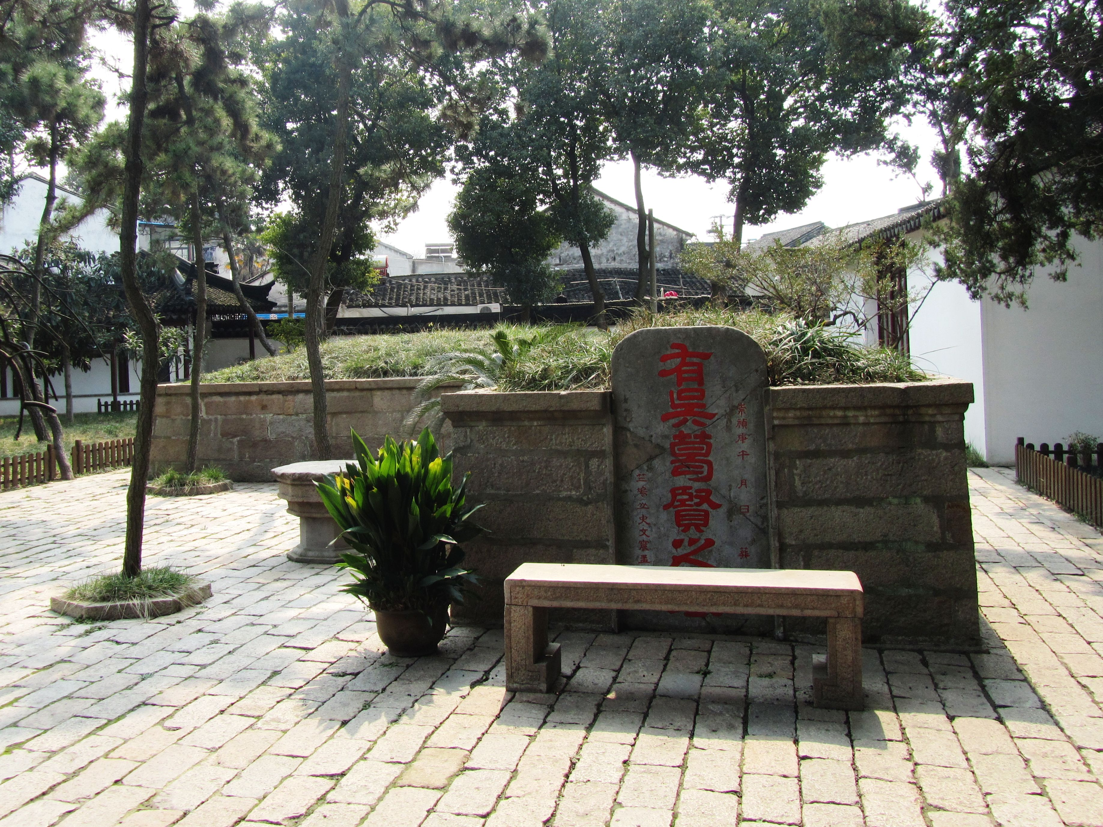 苏州山塘街葛成墓，后侧为五人墓。